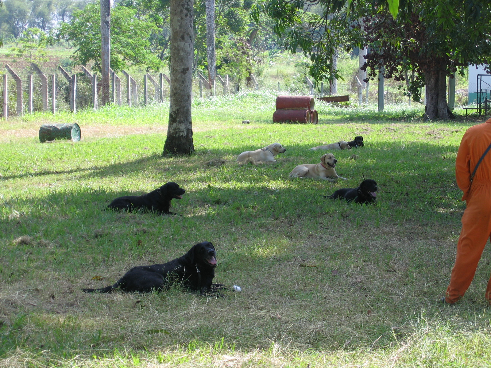 Esercizio di obbedienza eseguito da cani in gruppo